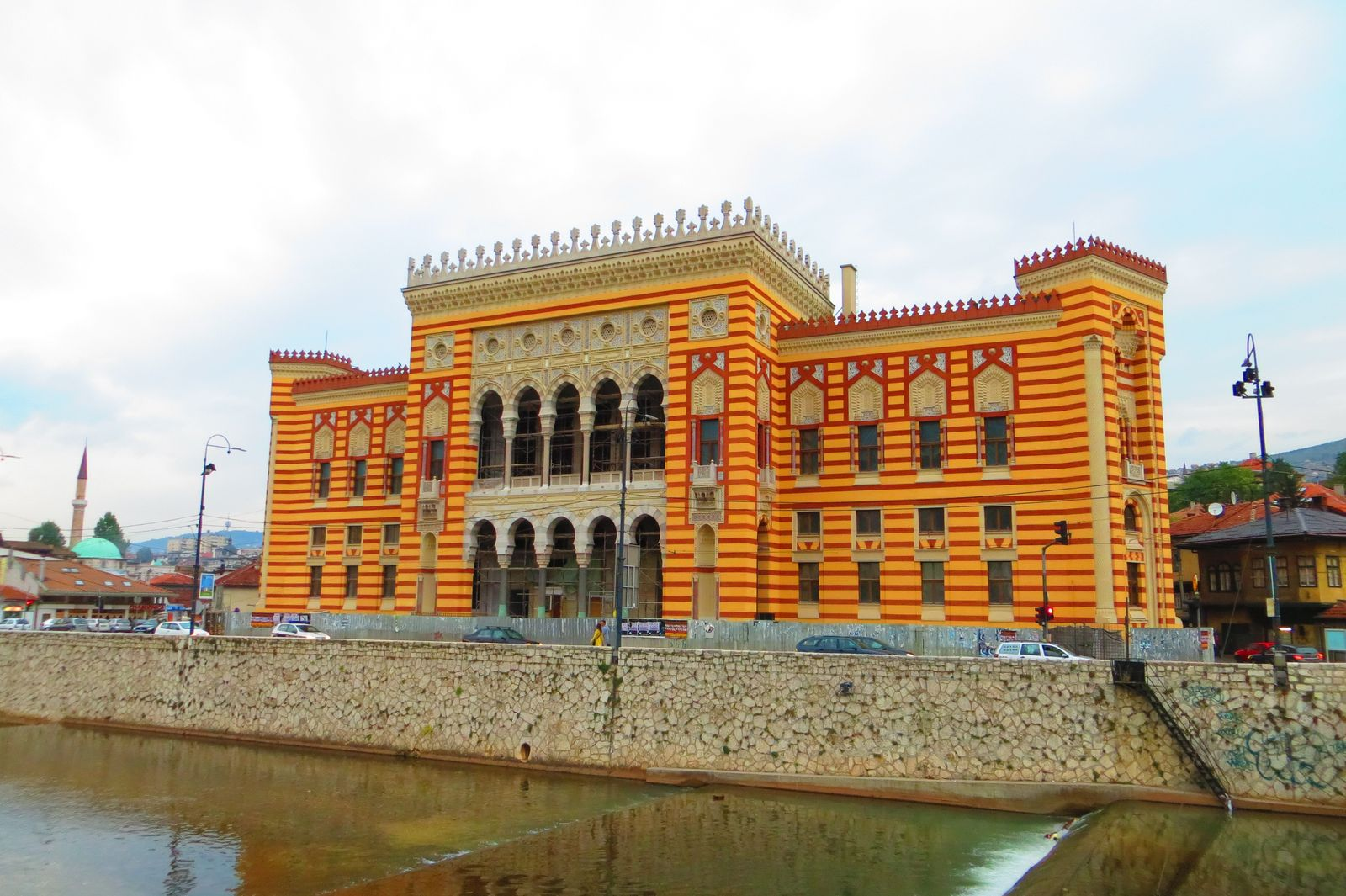 Gradska većnica